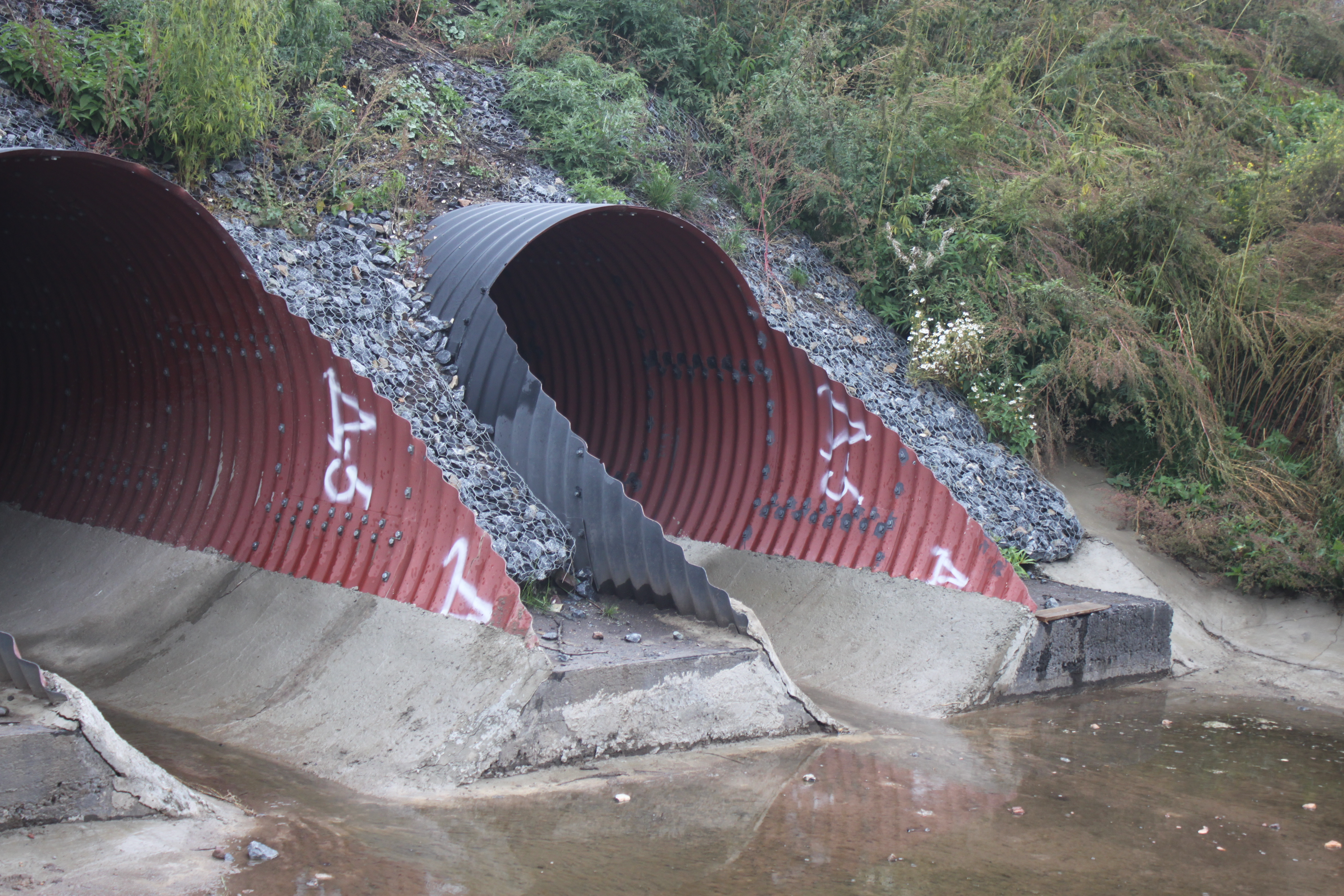 Двухочковая гофрированная труба